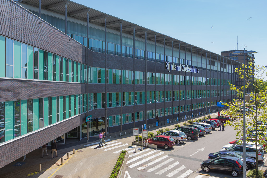 Rijnland Ziekenhuis locatie Leiderdorp